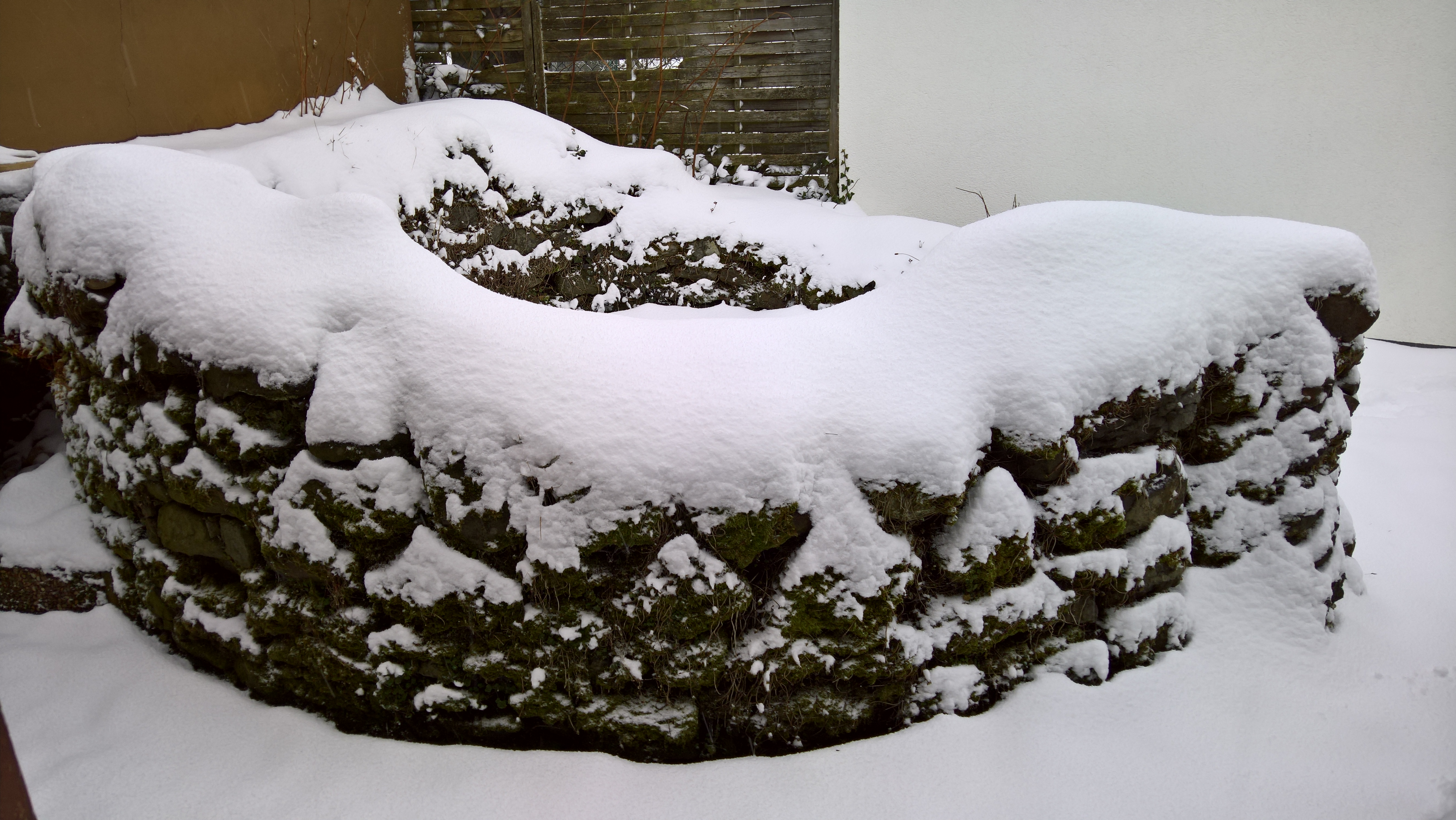 Der Turmstumpf unter Schnee des Burgstalles Spyelberg; Blick nach Osten